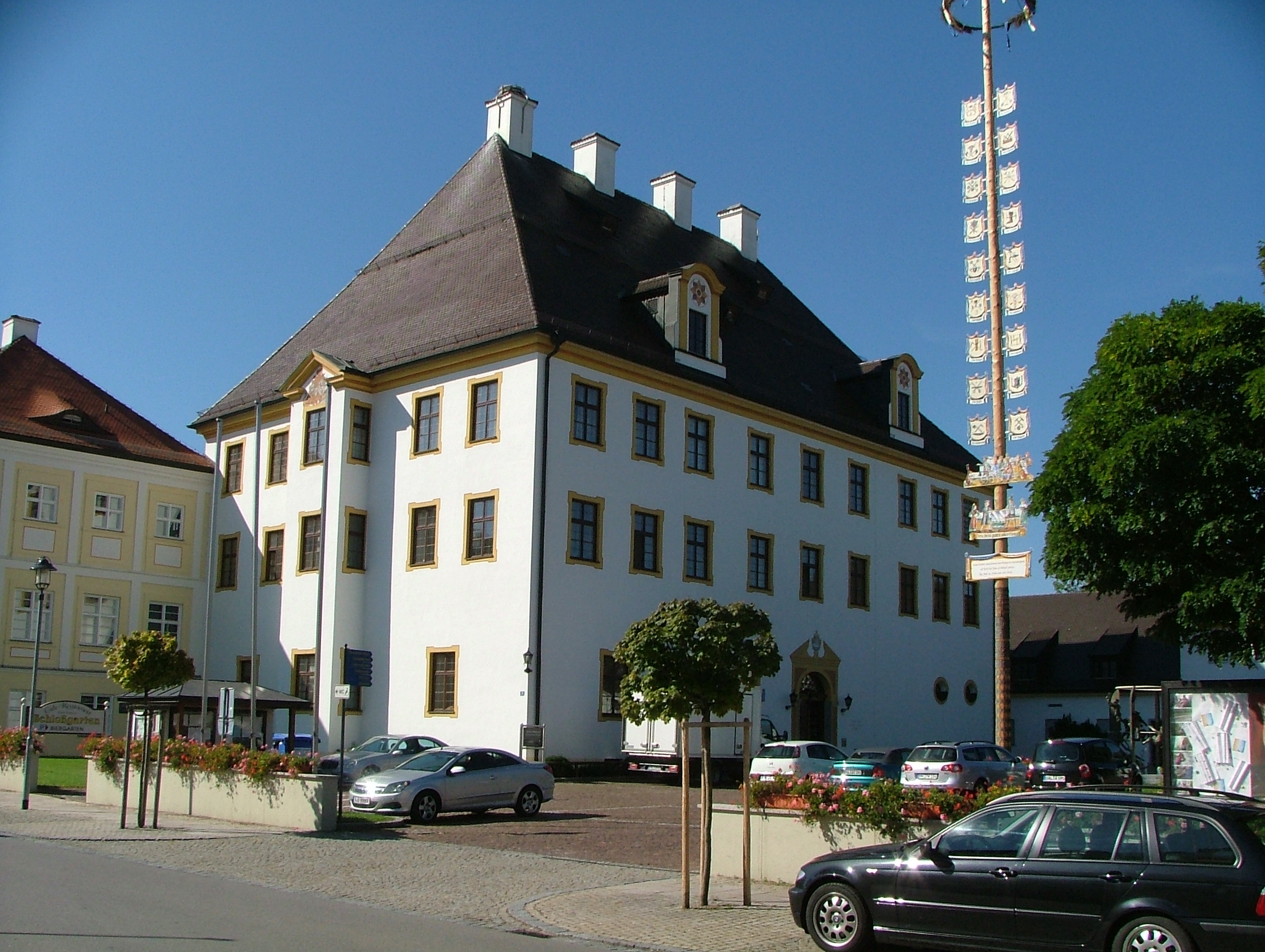 Schloss